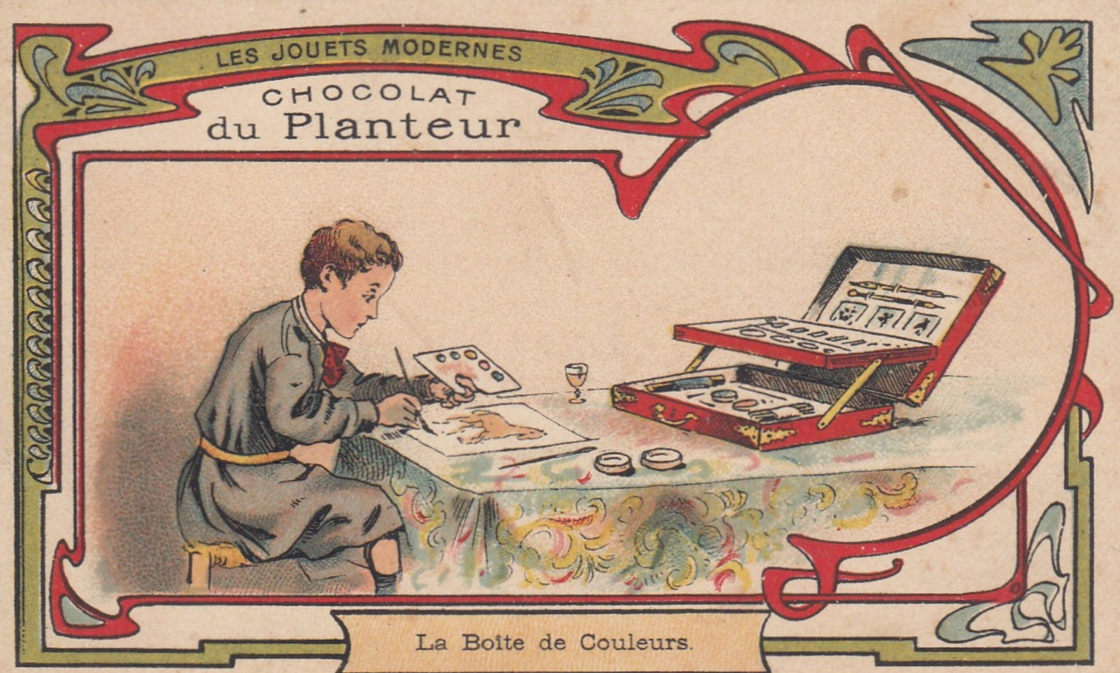 Les jouets modernes, La Boîte de couleurs; carte chromo du Chocolat du Planteur